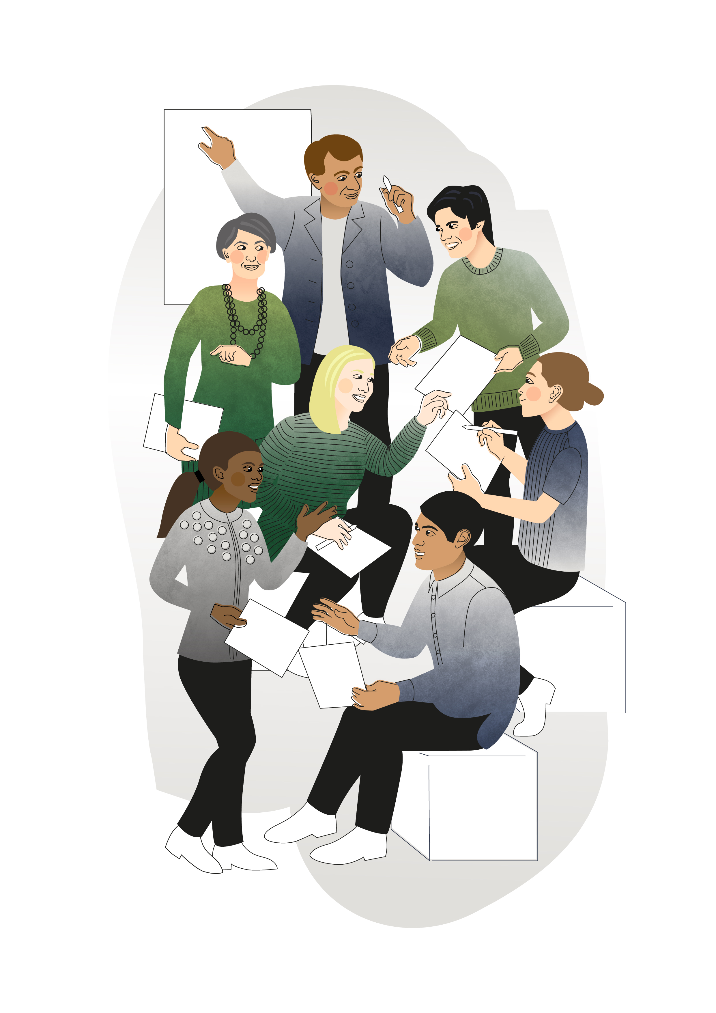 Ryhmäkuva pysty